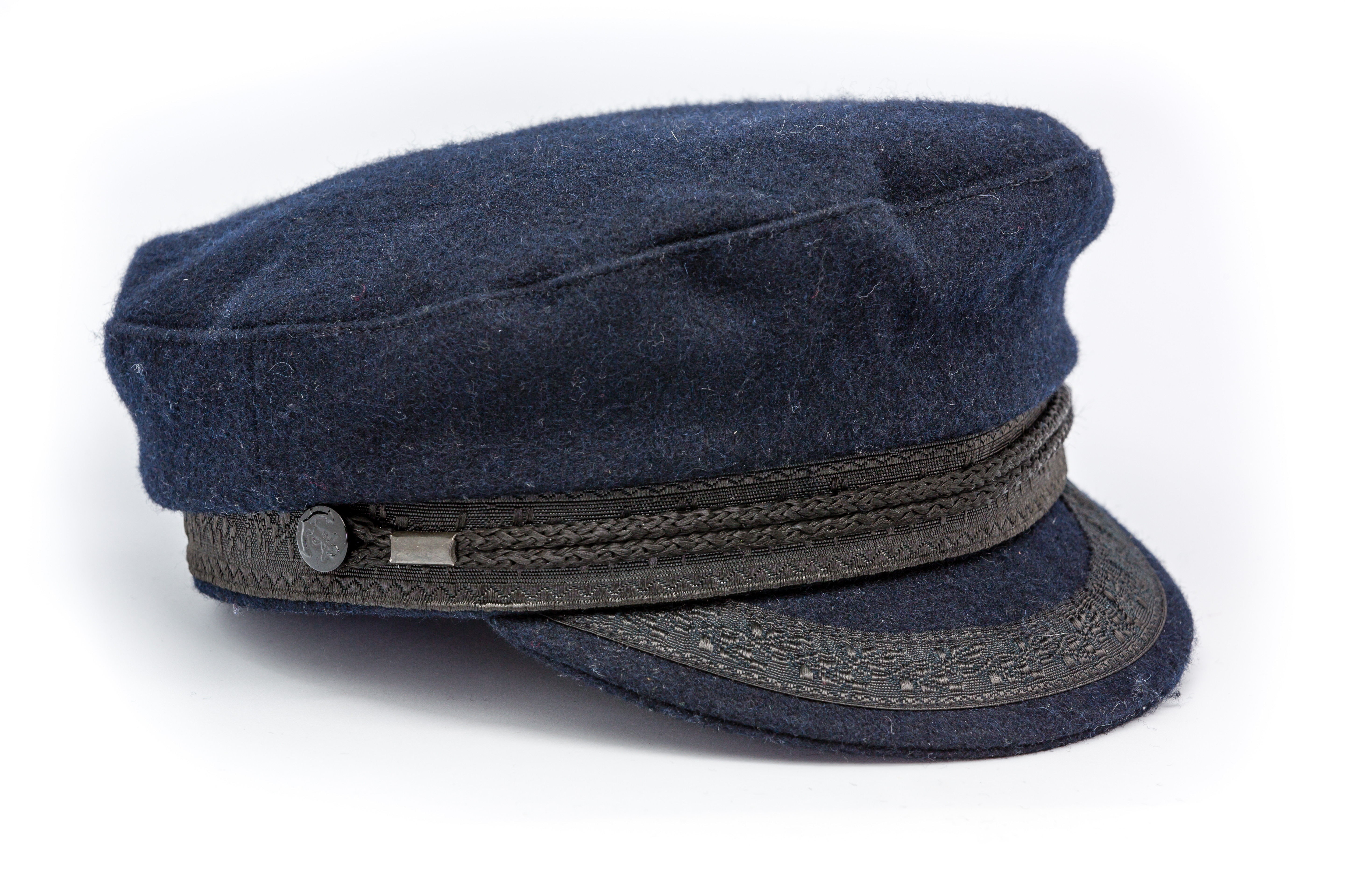 Casquette bleu marine, en feutre et polyamide.